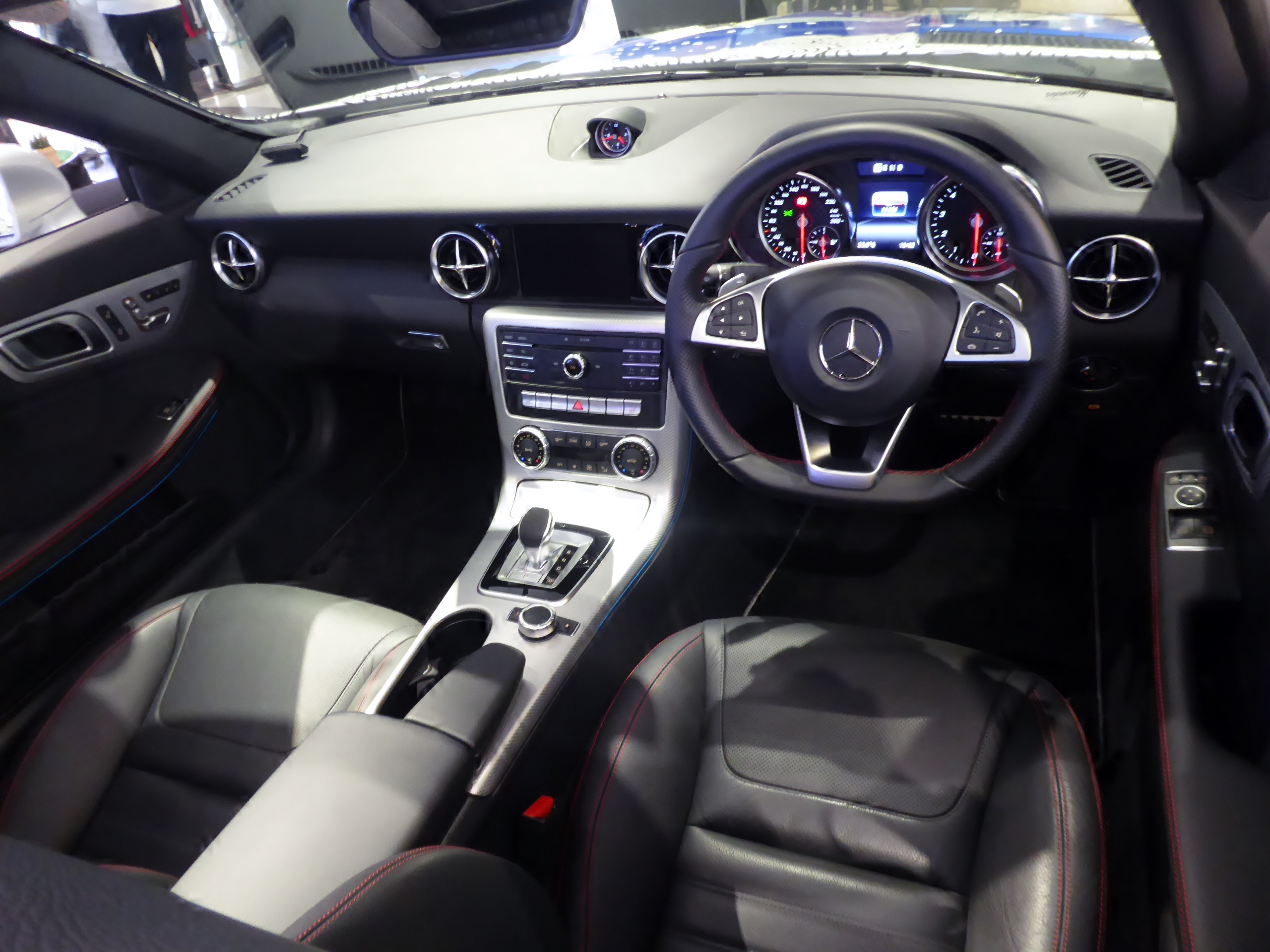 R172系メルセデス・ベンツ・SLC180 Sports うめだ文楽ラッピングカーのインテリアを撮影。